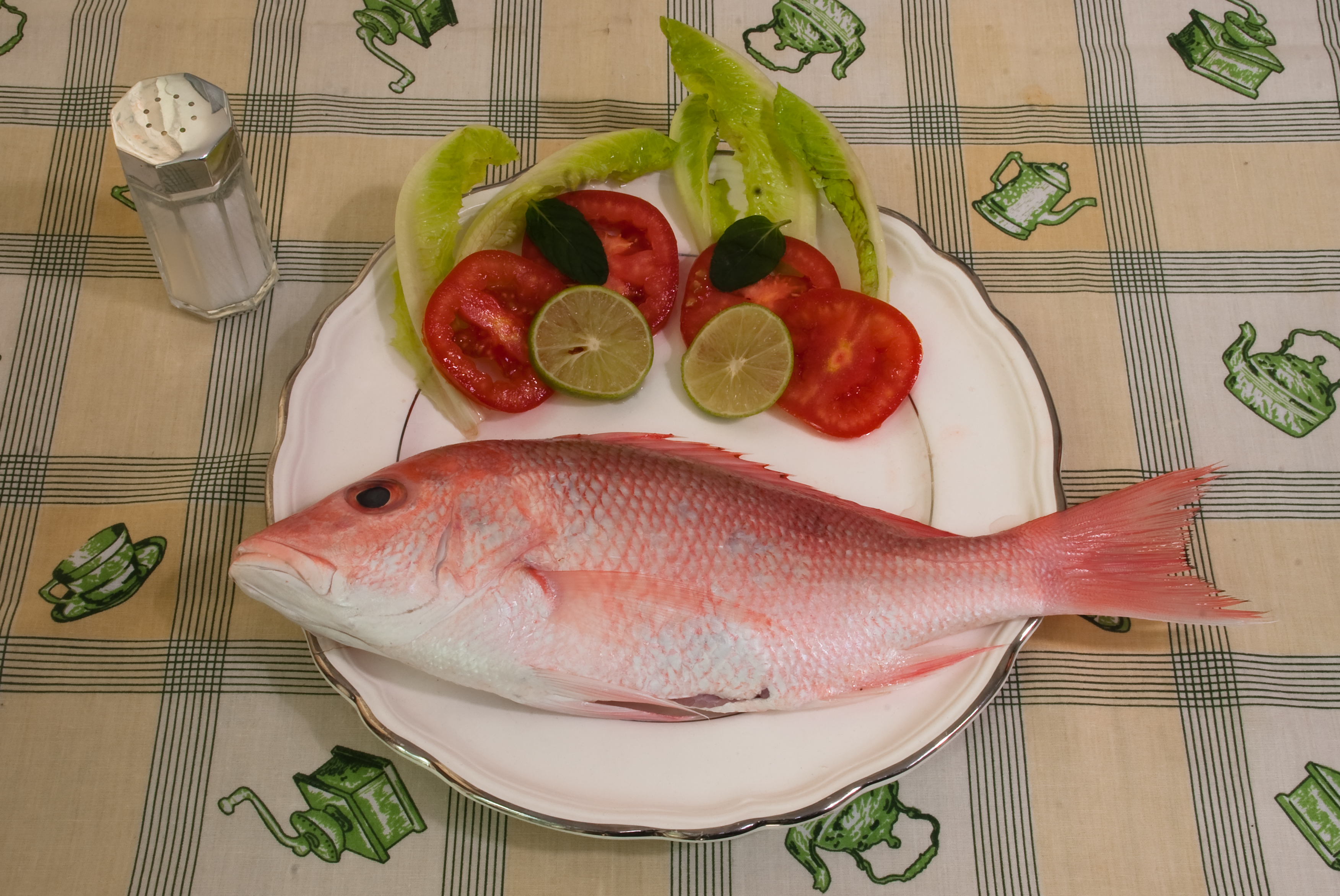 En la costa del Pacífico mexicano no existe ninguna medida regulatoria para estas especies objetivo que representan hasta el 62 por ciento con respecto a las especies asociadas. Se utilizan redes de pesca en las cuales quedan atrapados mamíferos marinos y tortugas. La mayor parte de la pesca se compone de organismos que no han alcanzado la madurez sexual. El primer periodo de desove en el año (abril-mayo) se sobrepone con una de las temporadas de mayor demanda en el mercado. Estas dos condiciones son negativas a la salud de la especie y las medidas de protección deben incorporar una temporada de veda, la talla mínima de captura y límite en los niveles de esfuerzo por región. Consulta la Lista Roja de Especies que Greenpeace acaba de publicar.